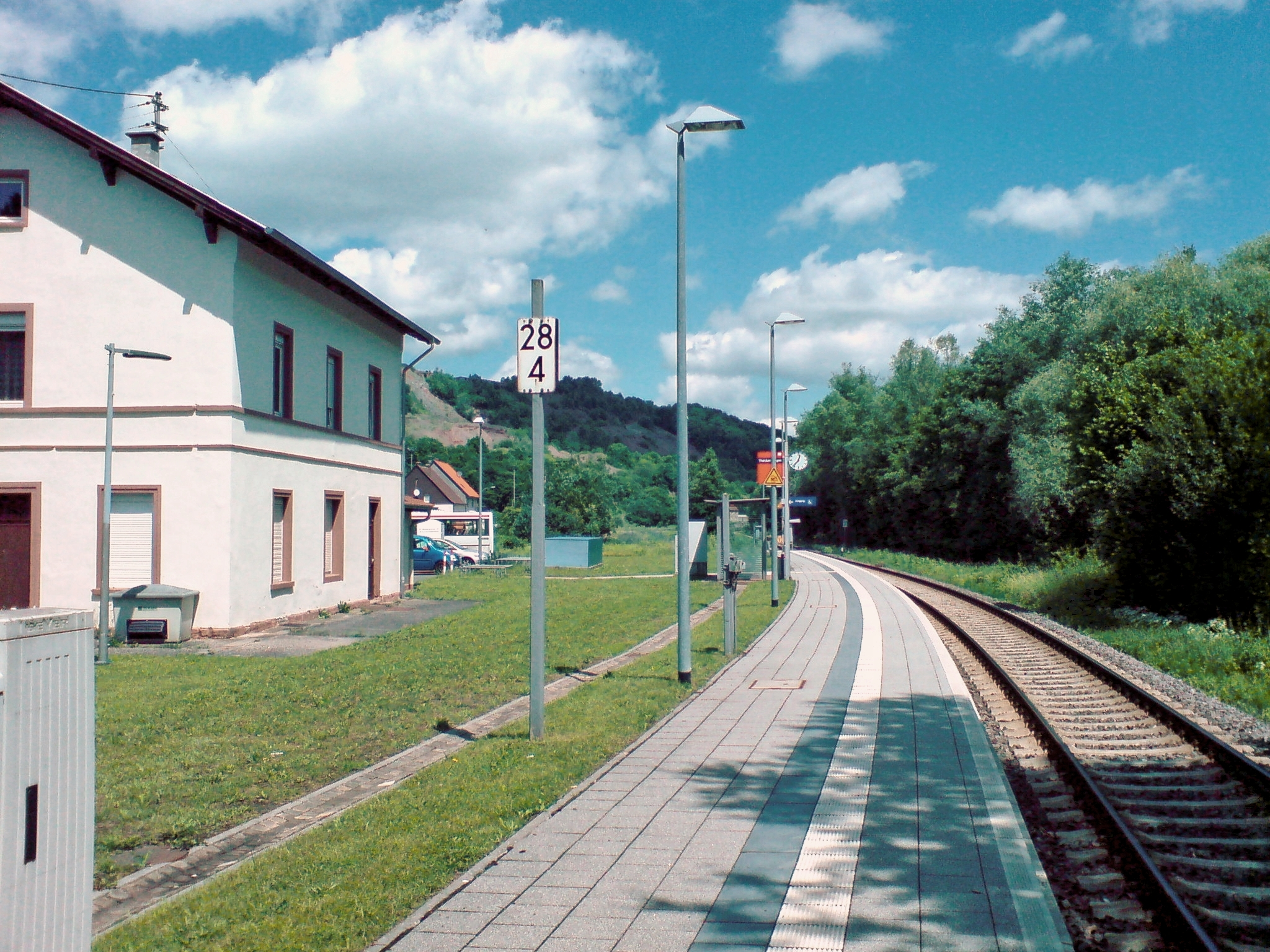 Bahnhof und Bahnsteig Theisbergstegen